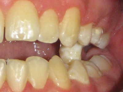 1999 : Réducteur d'espace inter-occlusal de repos (REIOR - CPD sprl, Liège-Bruxelles, Belgique)